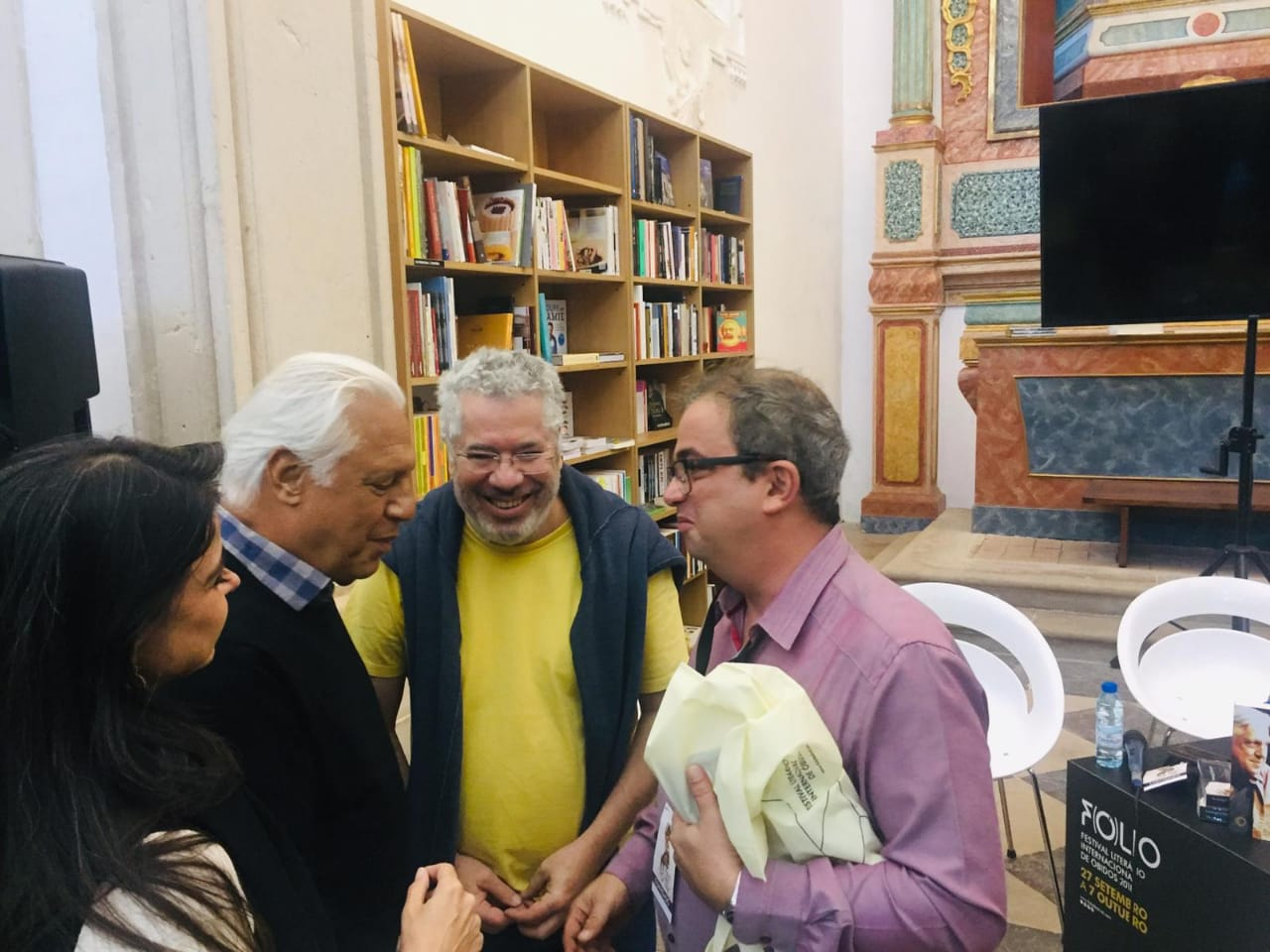 Renato Zupo e Antonio Fagundes dividiram palco no lançamento do livro Inteligência Prática em Portugal, no Festival Literário de Óbidos (2018).